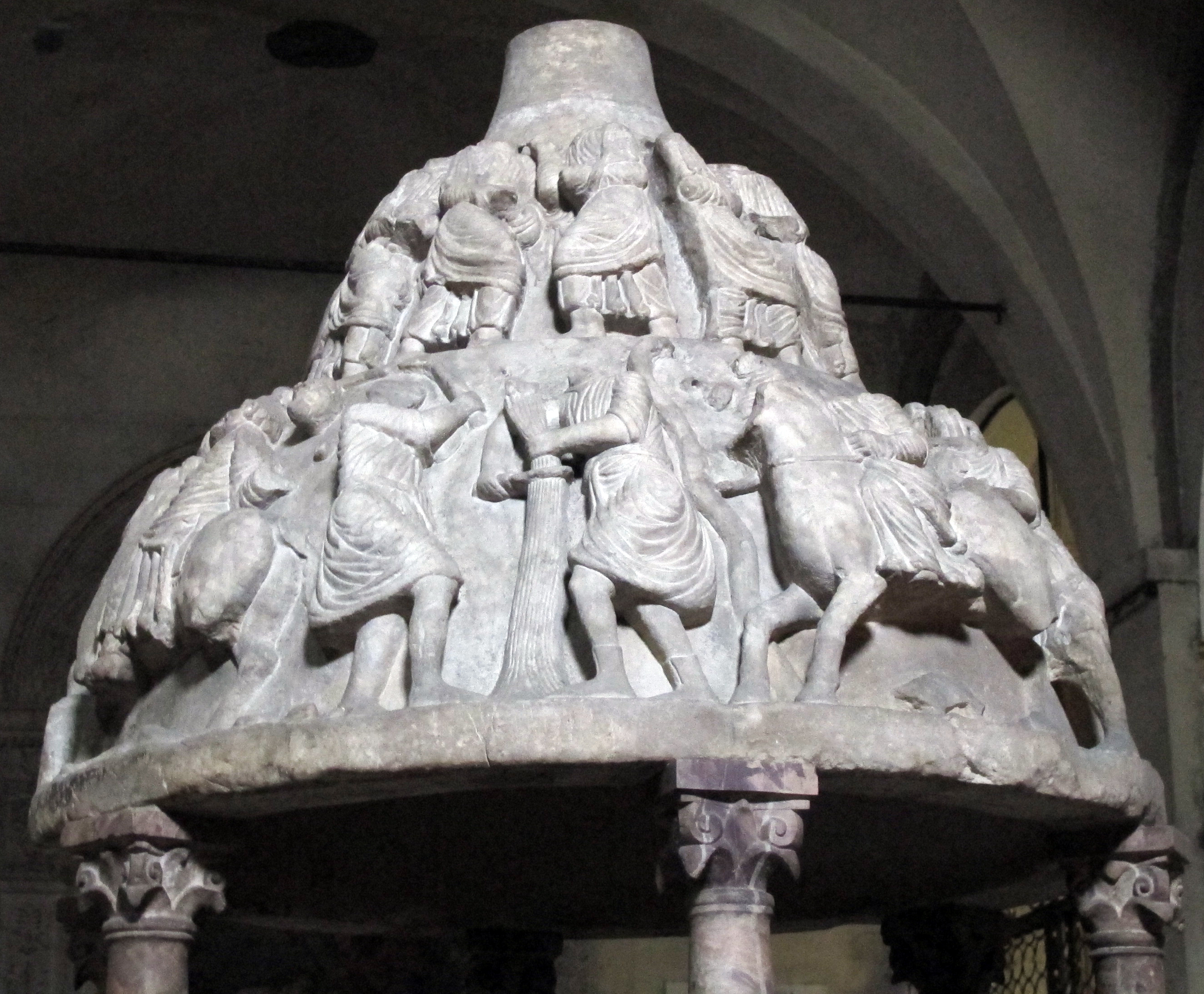 San Frediano (Lucca)